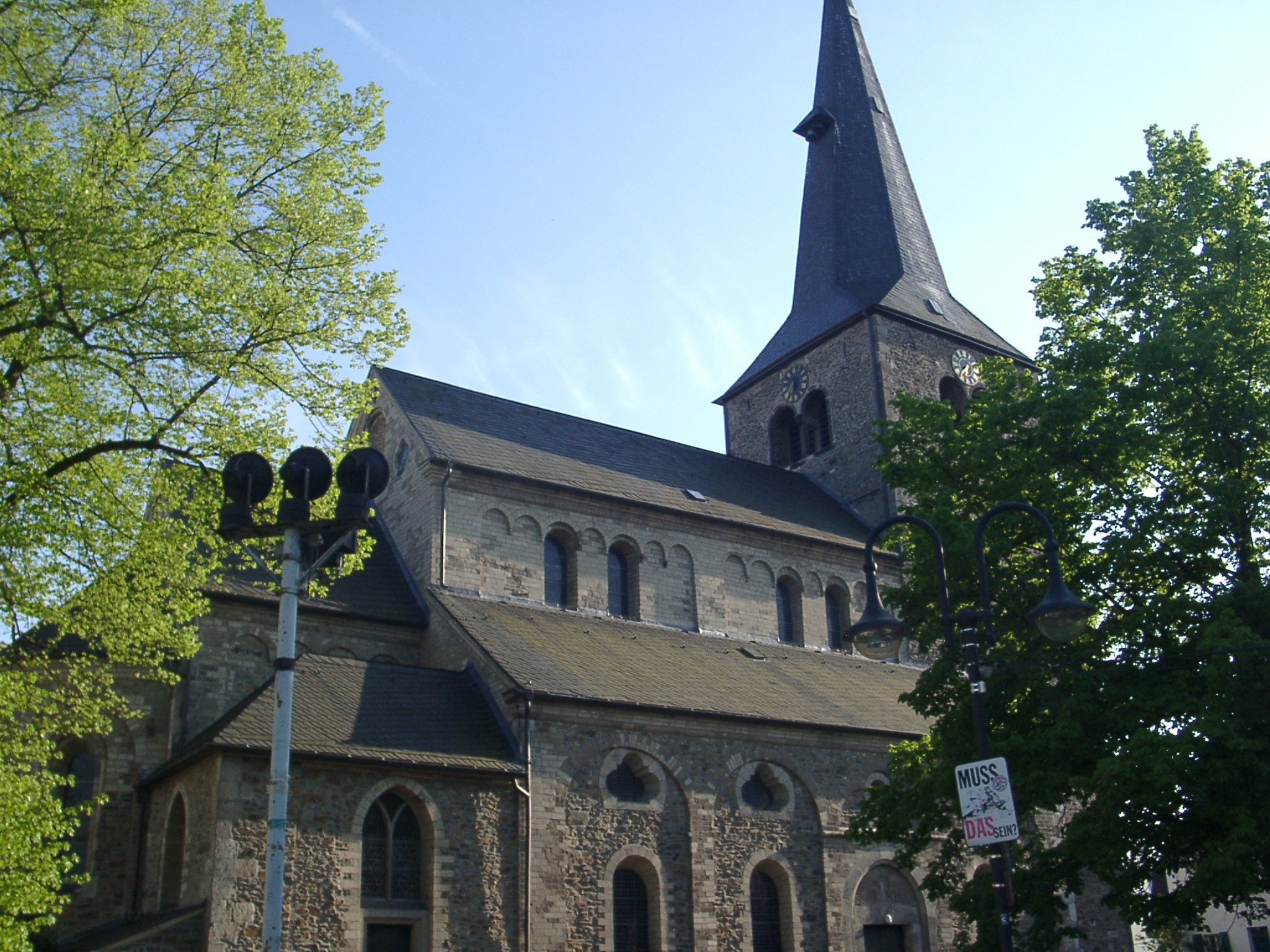 Hilden